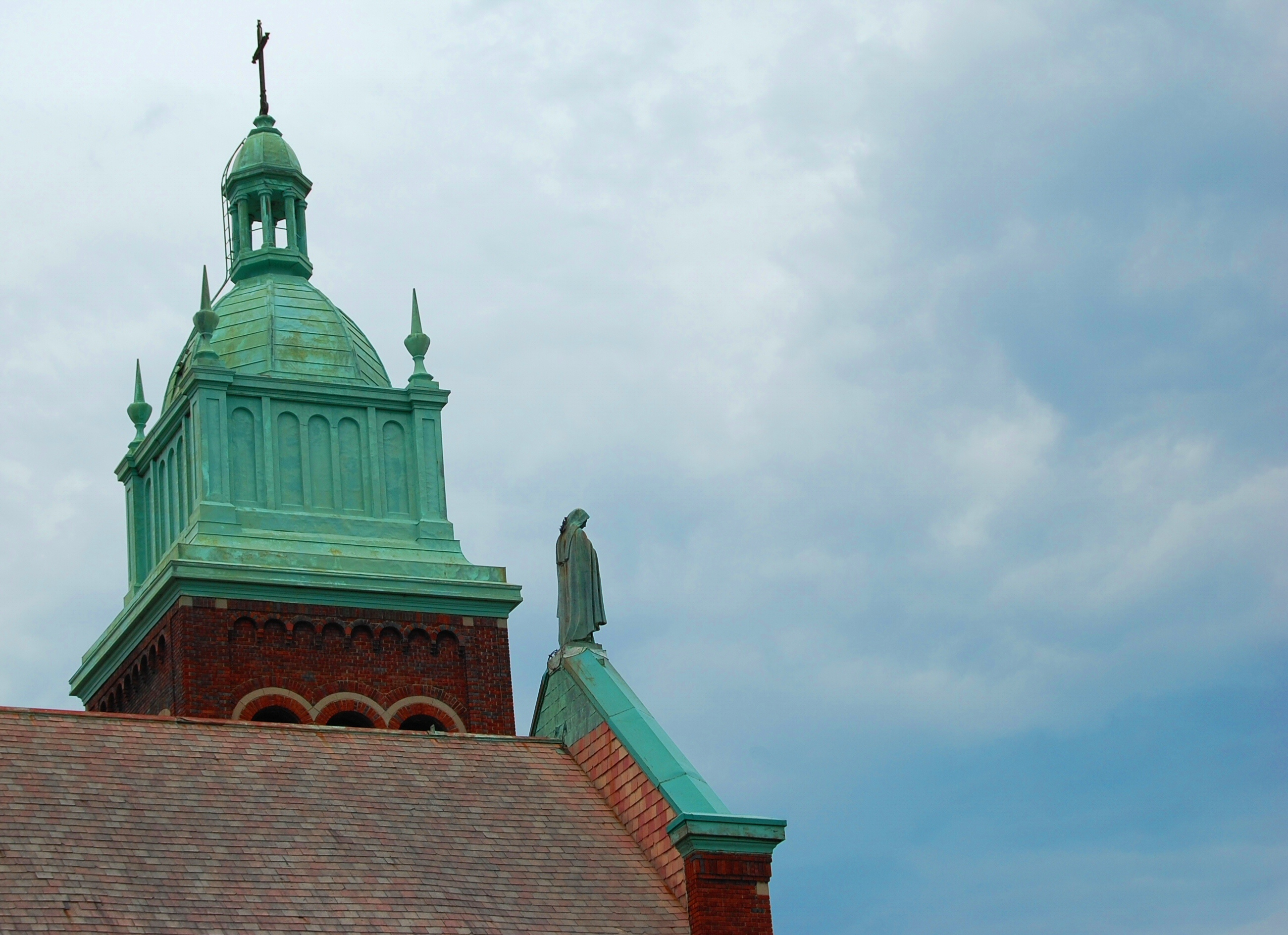 L'église Sainte-Thérèse-de-l'Enfant-Jésus d'Arvida, citée monument historique en 1999